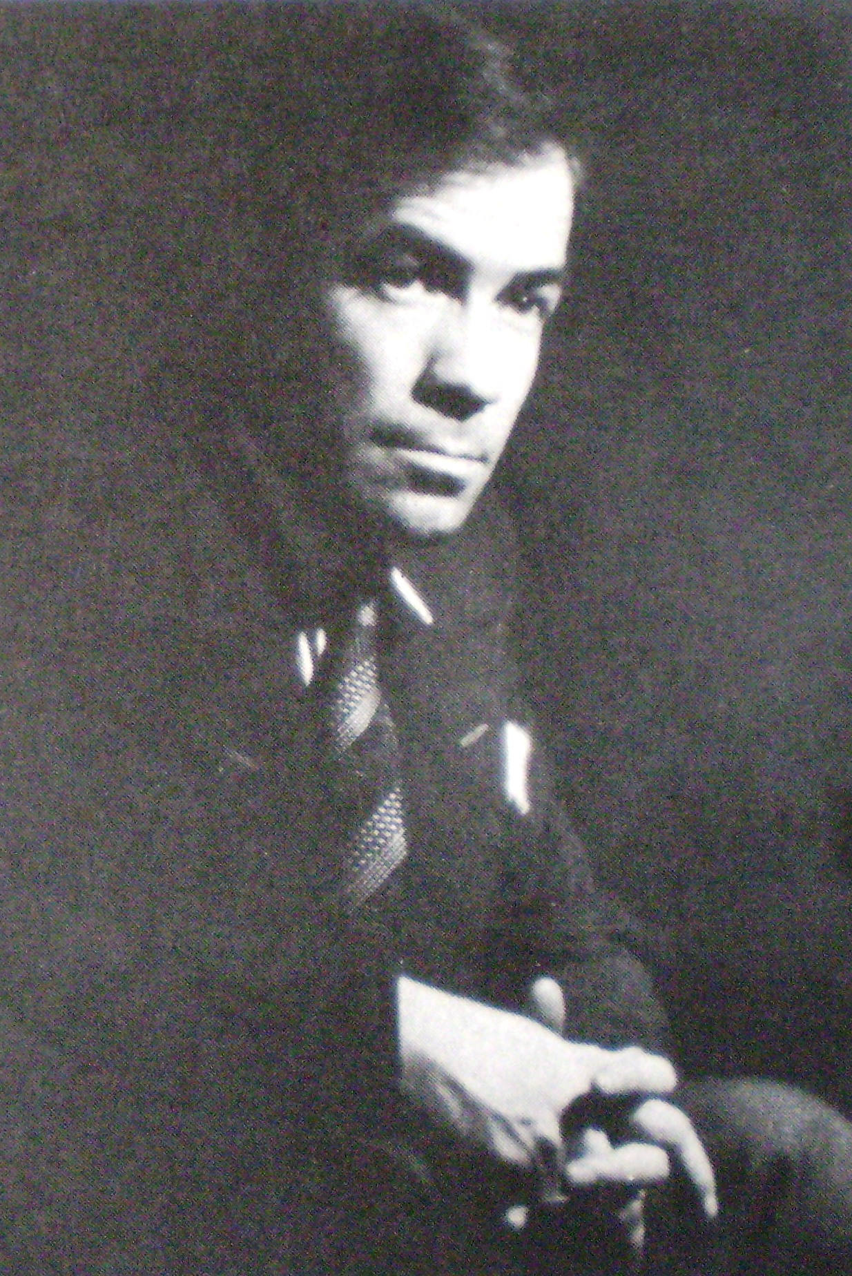 Demetrio Urruchúa